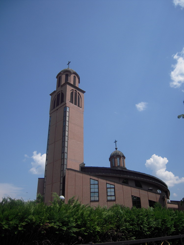 Rebrovačka crkva